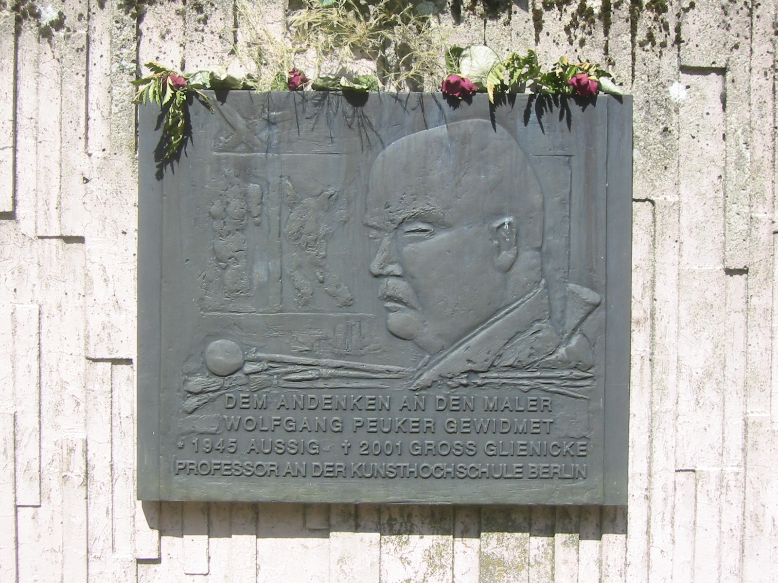 Gedenkplatte für Wolfgang Peuker am Glockenturm auf dem Landschaftsfriedhof Gatow